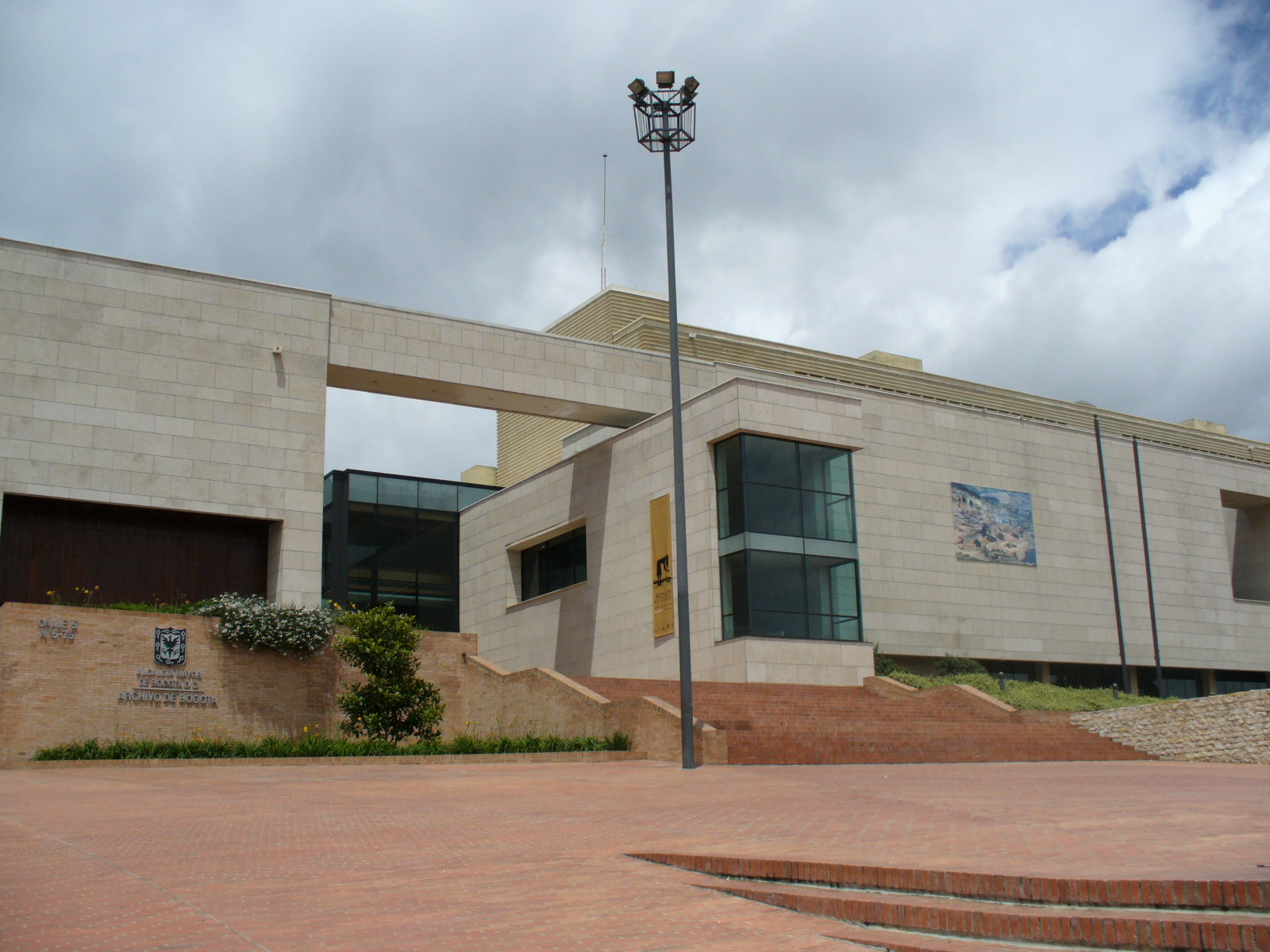 Fachada frontal del edificio del Archivo Distrital de Bogotá, Colombia